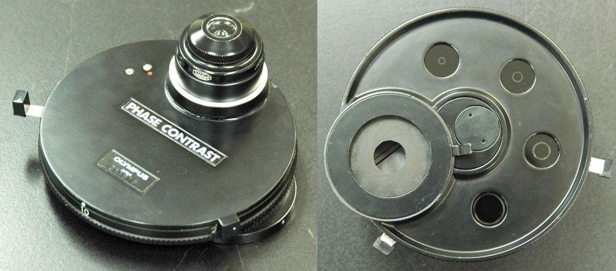 phase contrast microscope condenser・位相差顕微鏡用コンデンサ